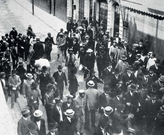 Escenas en Lima luego de la intentona golpista de los hermanos Piérola, contra el presidente Leguía. Mayo de 1909.